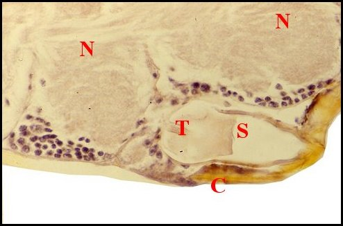 Autre coupe longitudinale de la glande labiosternale de Wendilgarda